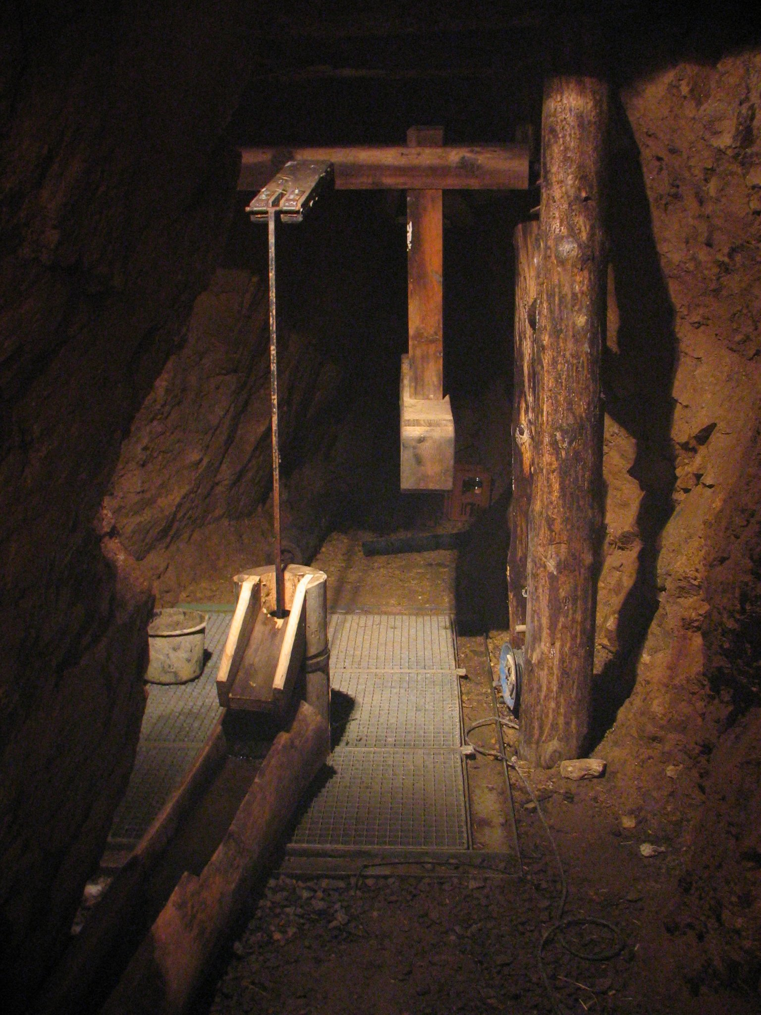 Nachbau einer Pumpe des 16. Jahrhunderts im Annastollen des mittelalterlichen Silberbergwerks Suggental